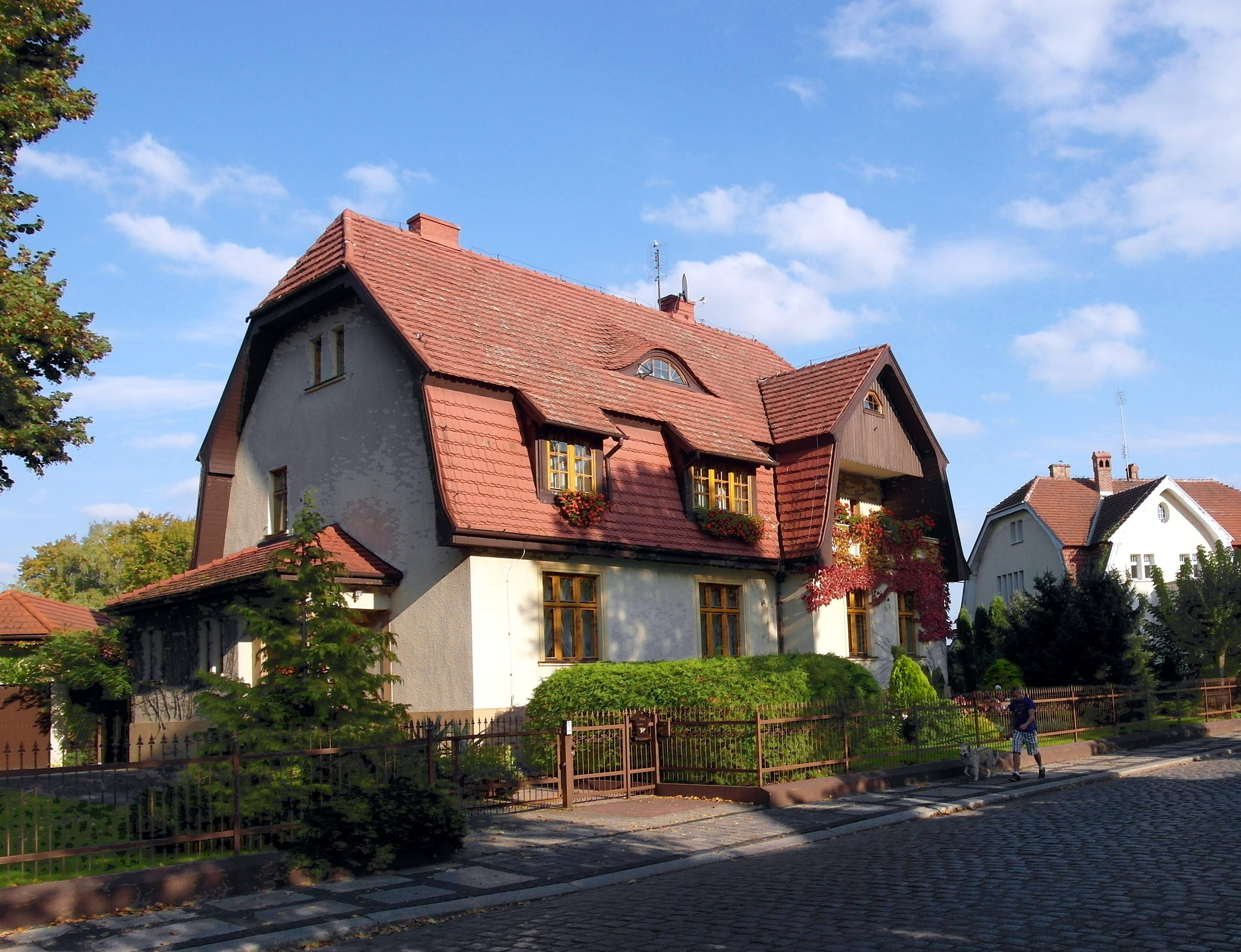 Willa fabrykancka z przełomu XIX i XX wieku w Dębnie